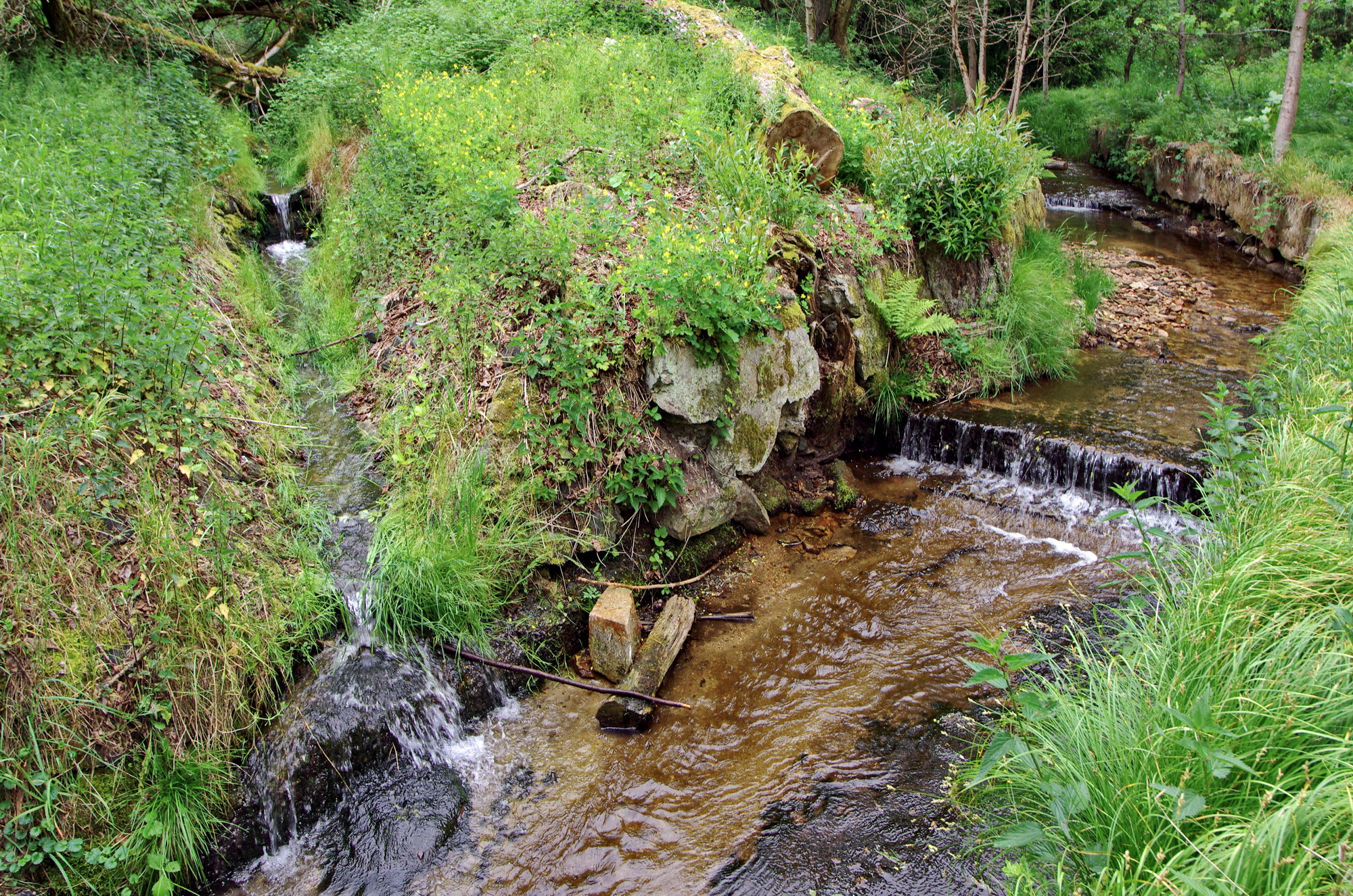 Novoveský potok u Rotavy, Krušné hory, okres Sokolov